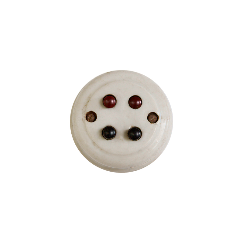 Wyłącznik przyciskowy podwójny, 1961 rok. Ówczesna nazwa producenta: Fabryka Sprzętu Elektrotechnicznego „KONTAKT” z siedzibą w Czechowicach - Dziedzicach.